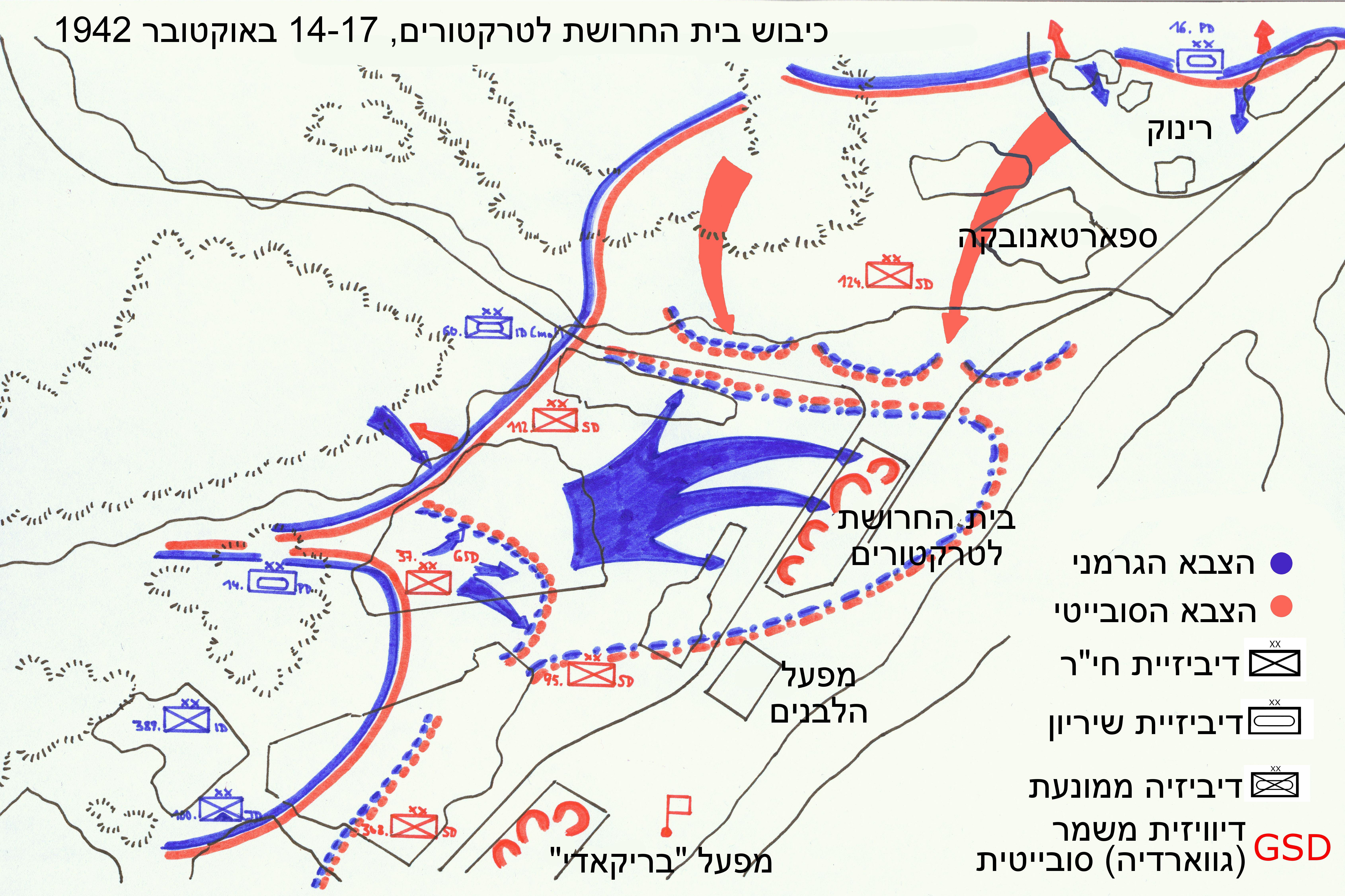 Stalingrad Traktorenwerk